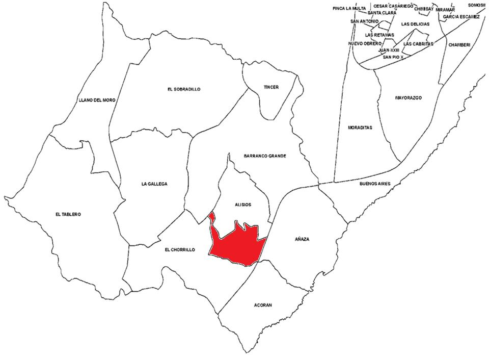 Localización de Santa María del Mar en el distrito Suroeste